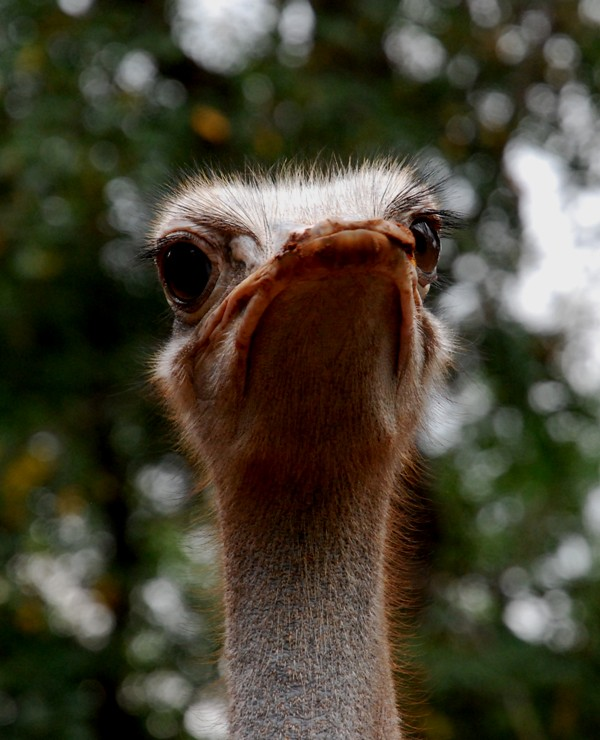 นกกระจอกเทศมีดวงตาขนาดใหญ่